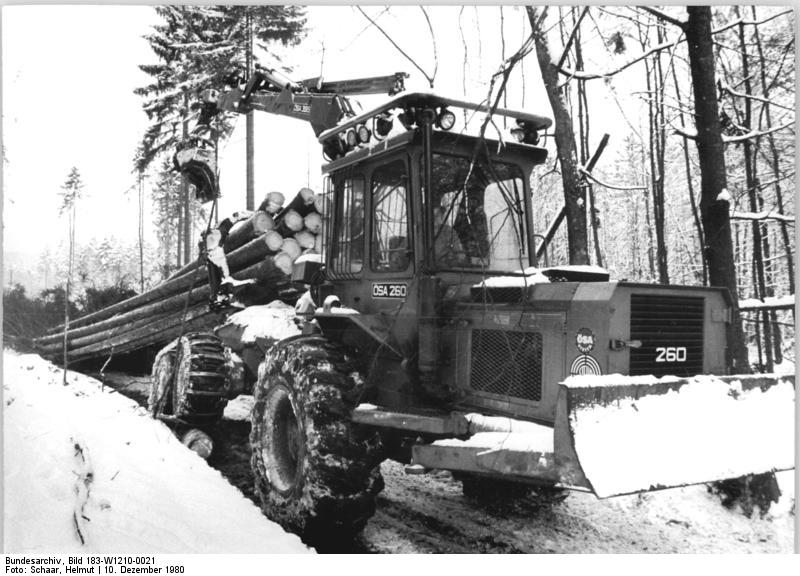 Hildburghausen, Schlepper beim Holzrücken ADN-ZB Schaar 10.12.1980 Bezirk Suhl: Erschwerte Bedingungen brachten die starken Schneefälle der letzten Zeit für die Forstwirtschaft des Bezirkes Suhl. Trotzdem bemühen sich die hier Beschäftigten um eine zügige Weiterführung der Arbeiten. Eine Fäll-Rückekombine OFSA-260 bringt gefällte Fichten zur Entastungsmaschine auf einem Holzverarbeitungsplatz des Staatlichen Forstwirtschaftsbetriebes Hildburghausen - siehe auch W 1210-20N -.